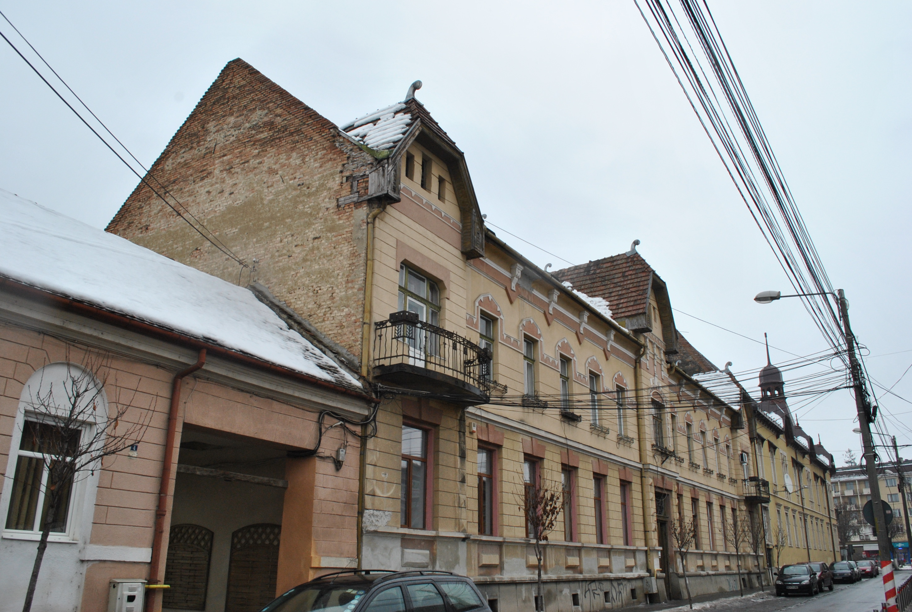 Ansamblul urban "Str. Horia"